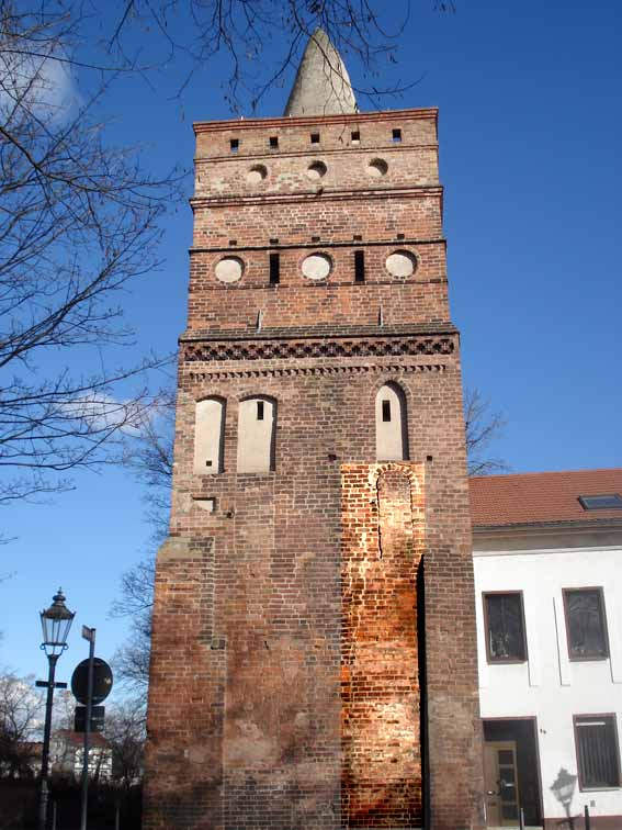 Der Rathenower Torturm von Süden mit herausgearbeitetem ehemaligen Mauernaschluss